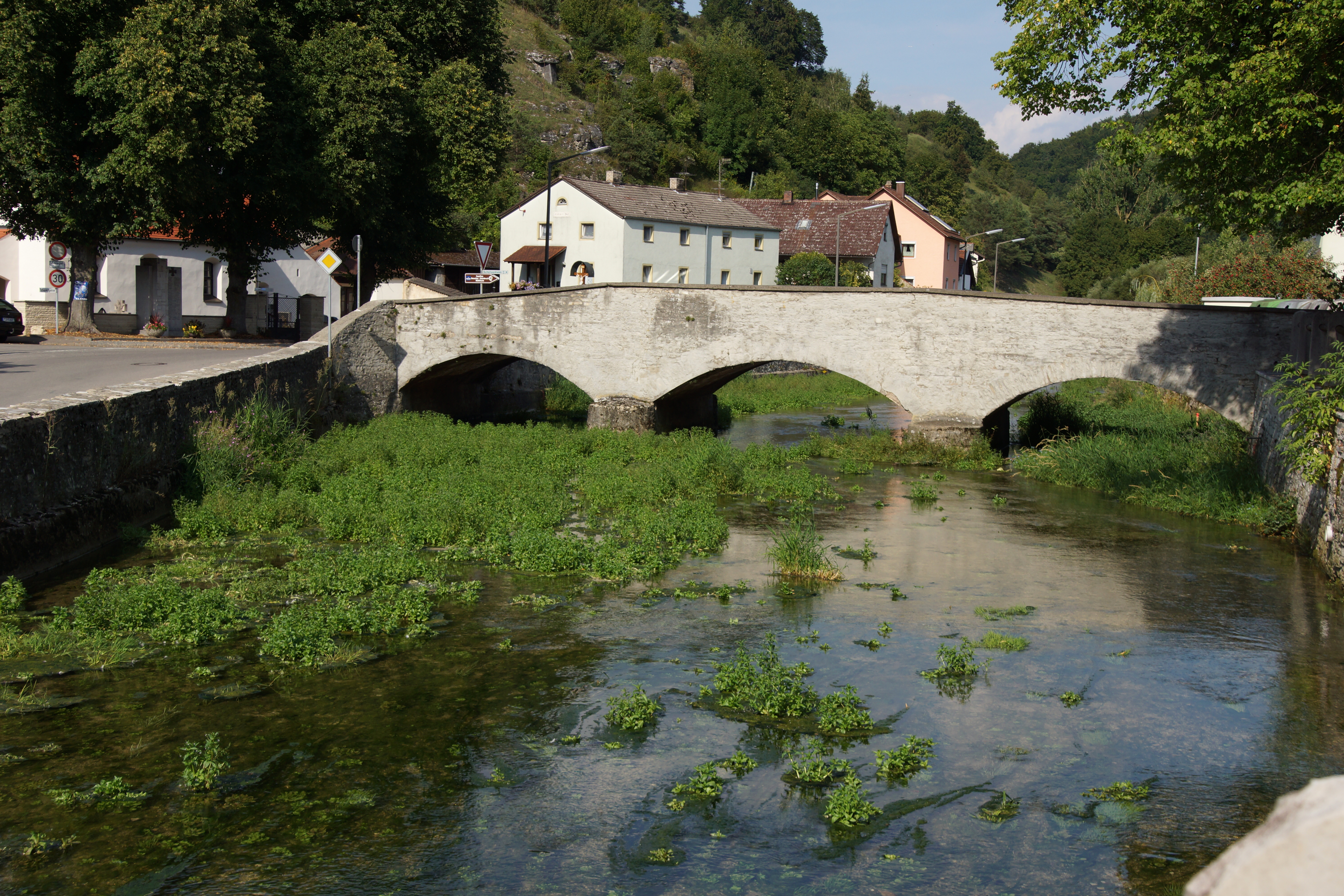 Mühlheim, Markt Mörnsheim